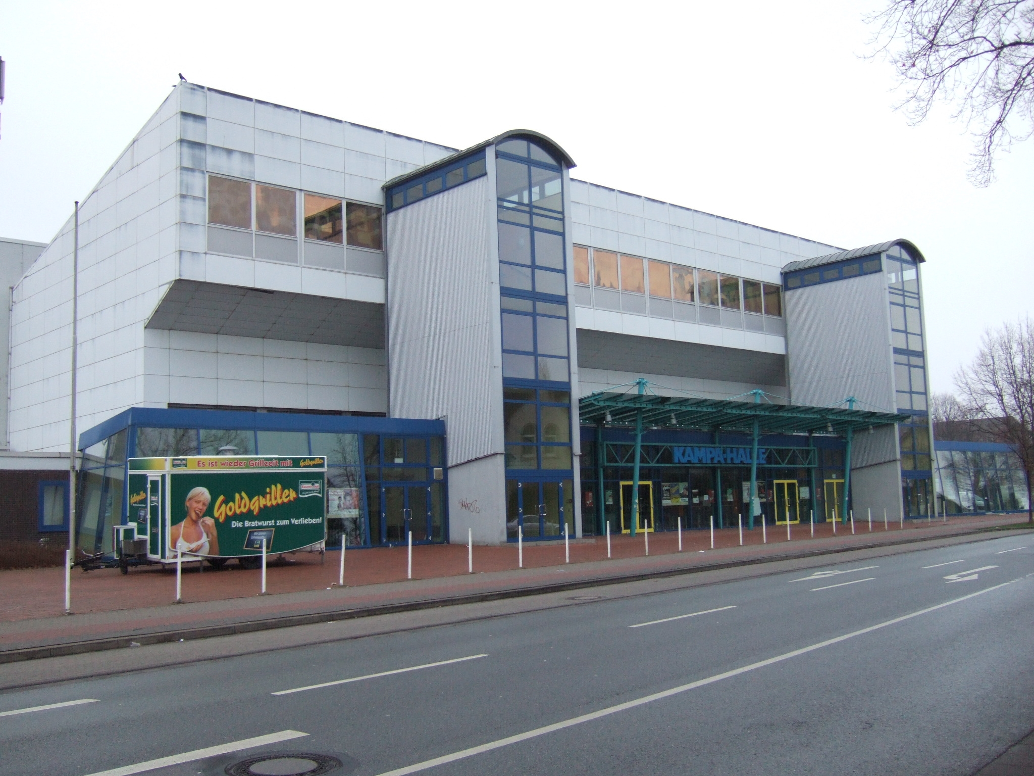 Veranstaltungsort Kampa-Halle in Minden (Westf.), Nordrhein-Westfalen. Die Halle ist die Heimspielstätte vom Handballbundesligisten GWD Minden.